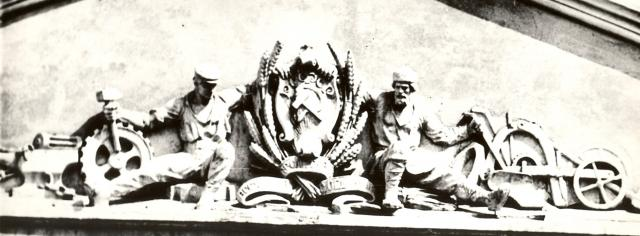 Работы скульптора Степана Романовича Надольского (13 декабря 1882 года, село Ужур Ужурского района Красноярского края — 1943 год, город Рубцовск Алтайский край)